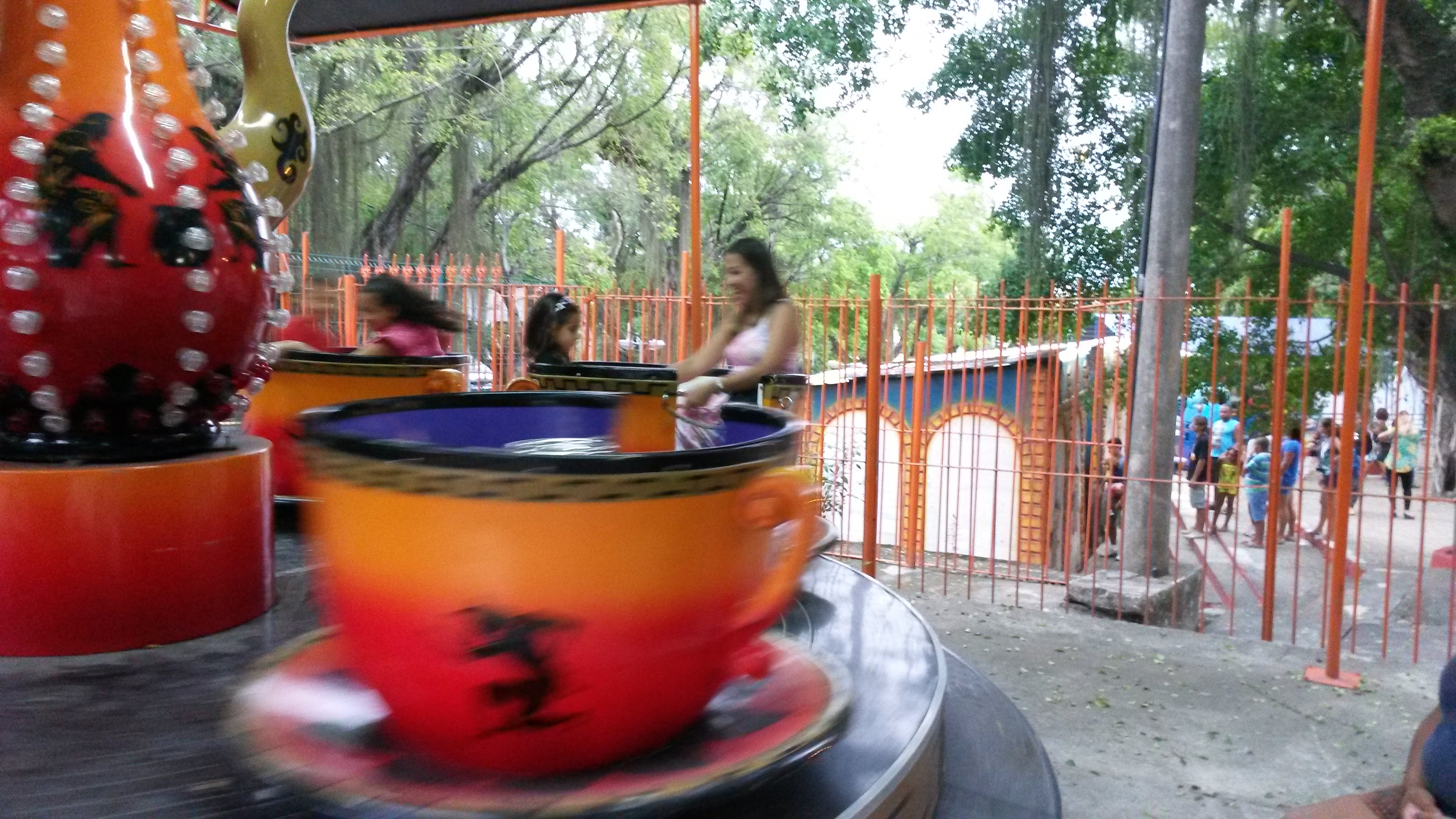 Brinquedo do Parque Shanguai, Penha, Rio de Janeiro